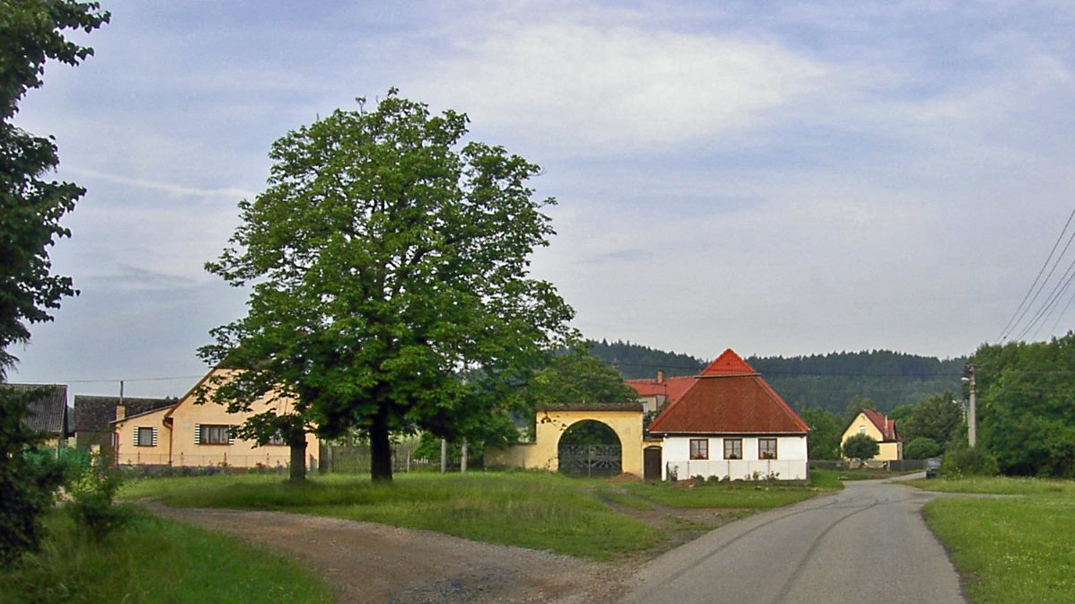 Chaloupka ve Lhotě pod Radčem.